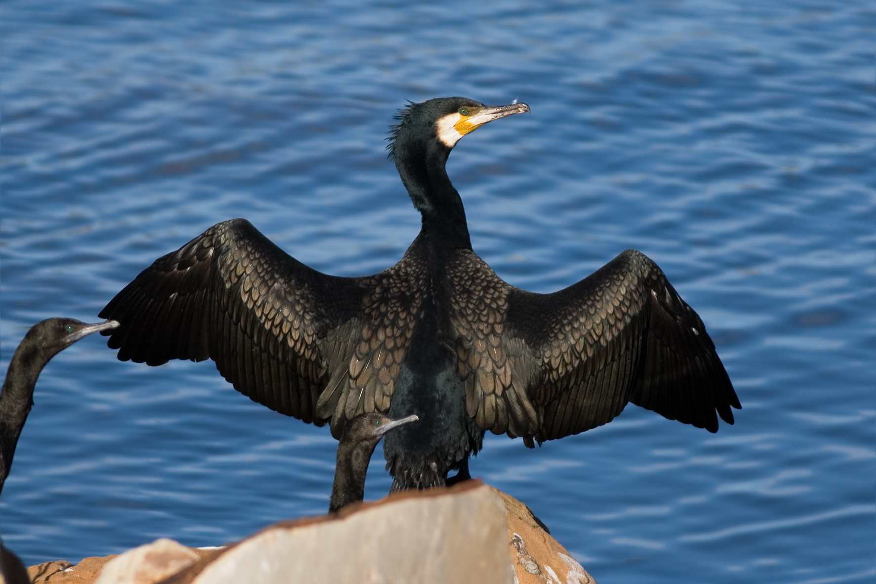 1.2 only